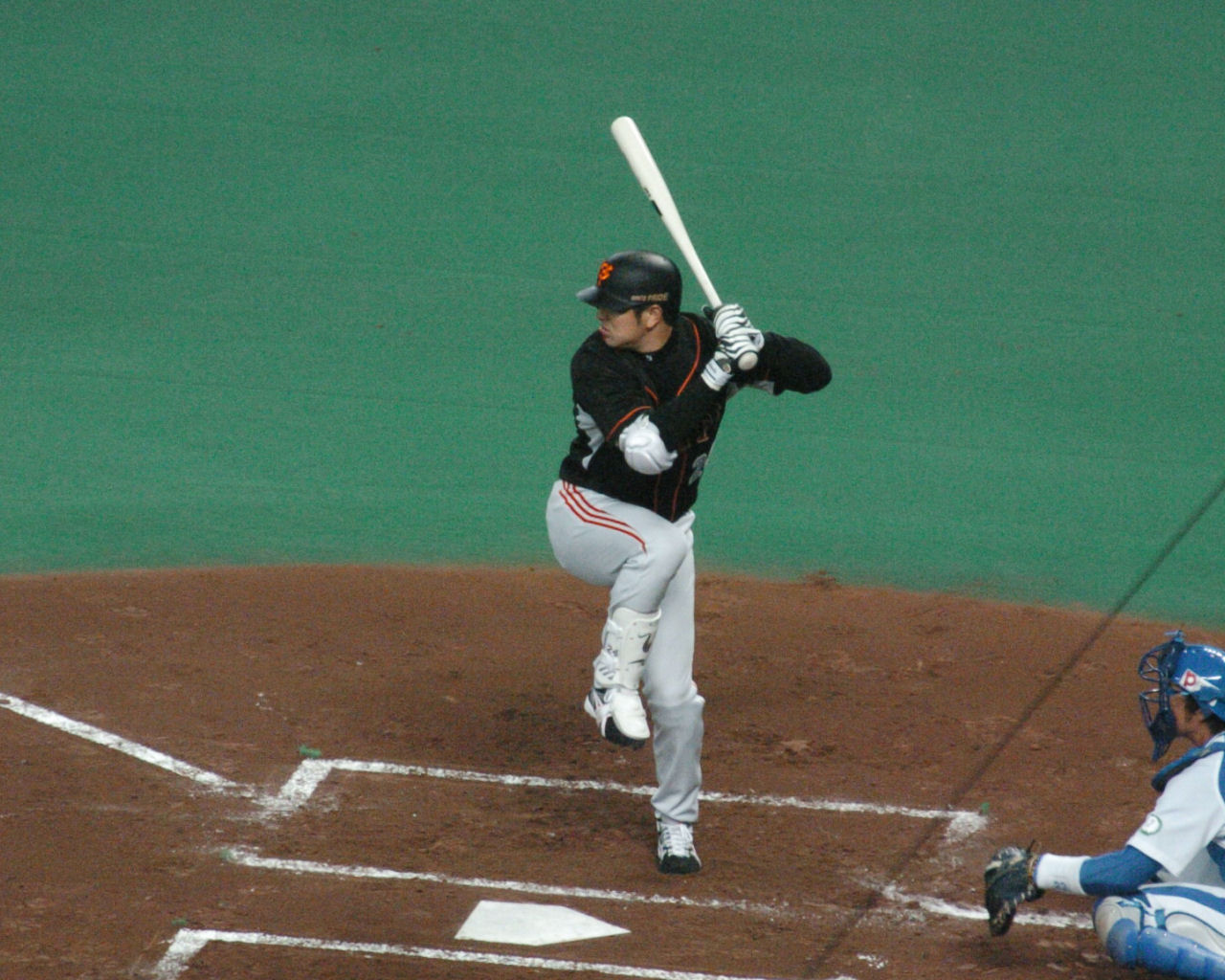 Copied from 画像:Takahashi yoshinobu.jpg: "投稿者が2006年5月に撮影"